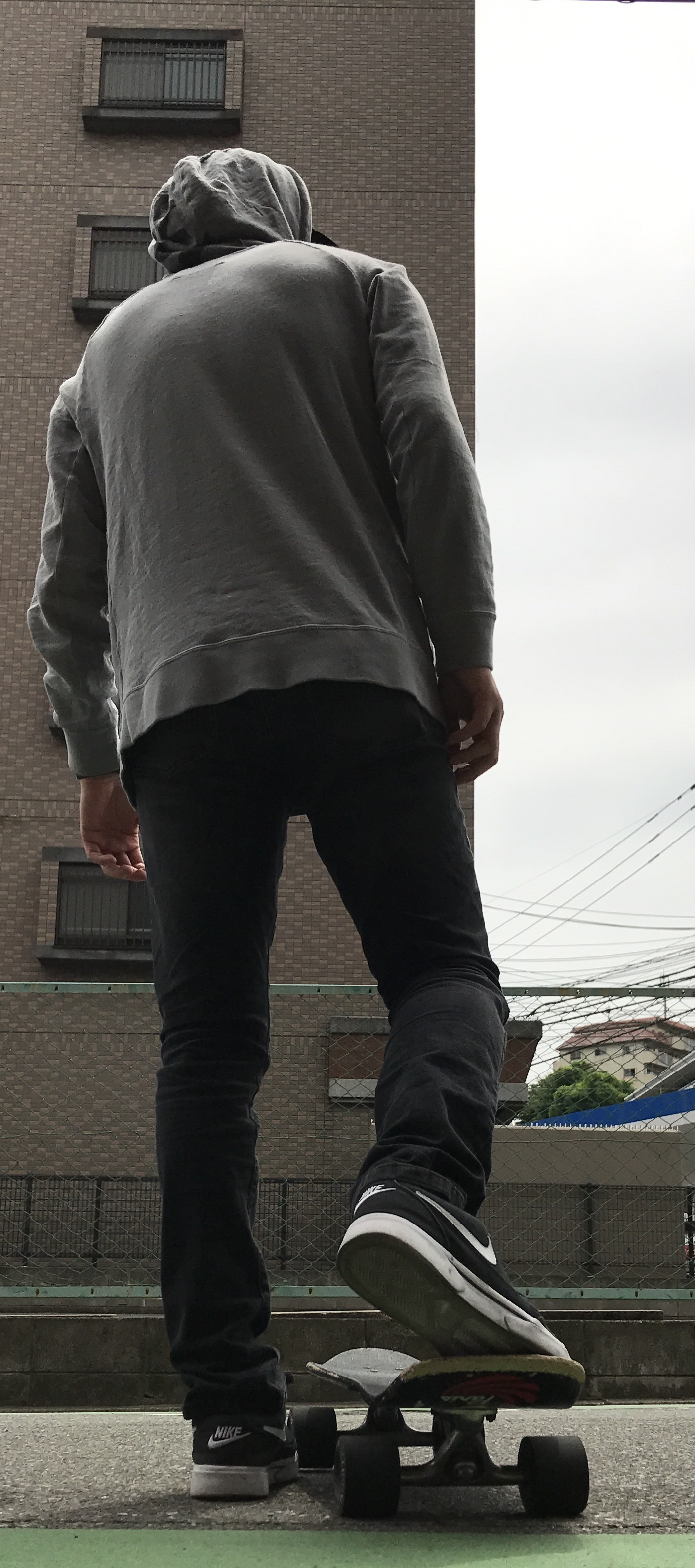 フードを被る人